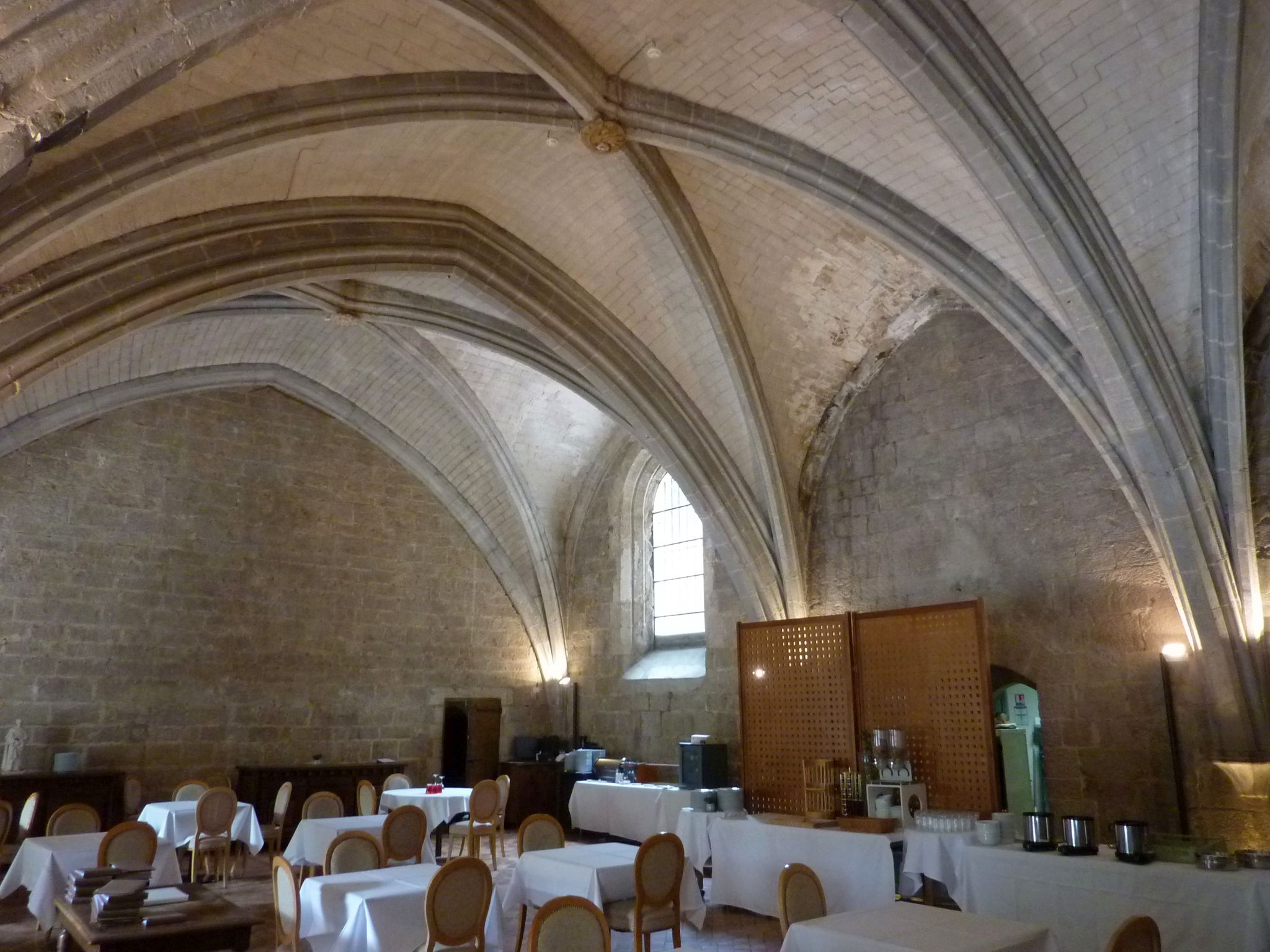 Couvent des Dominicains de Saint-Maximin-la-Sainte-Baume